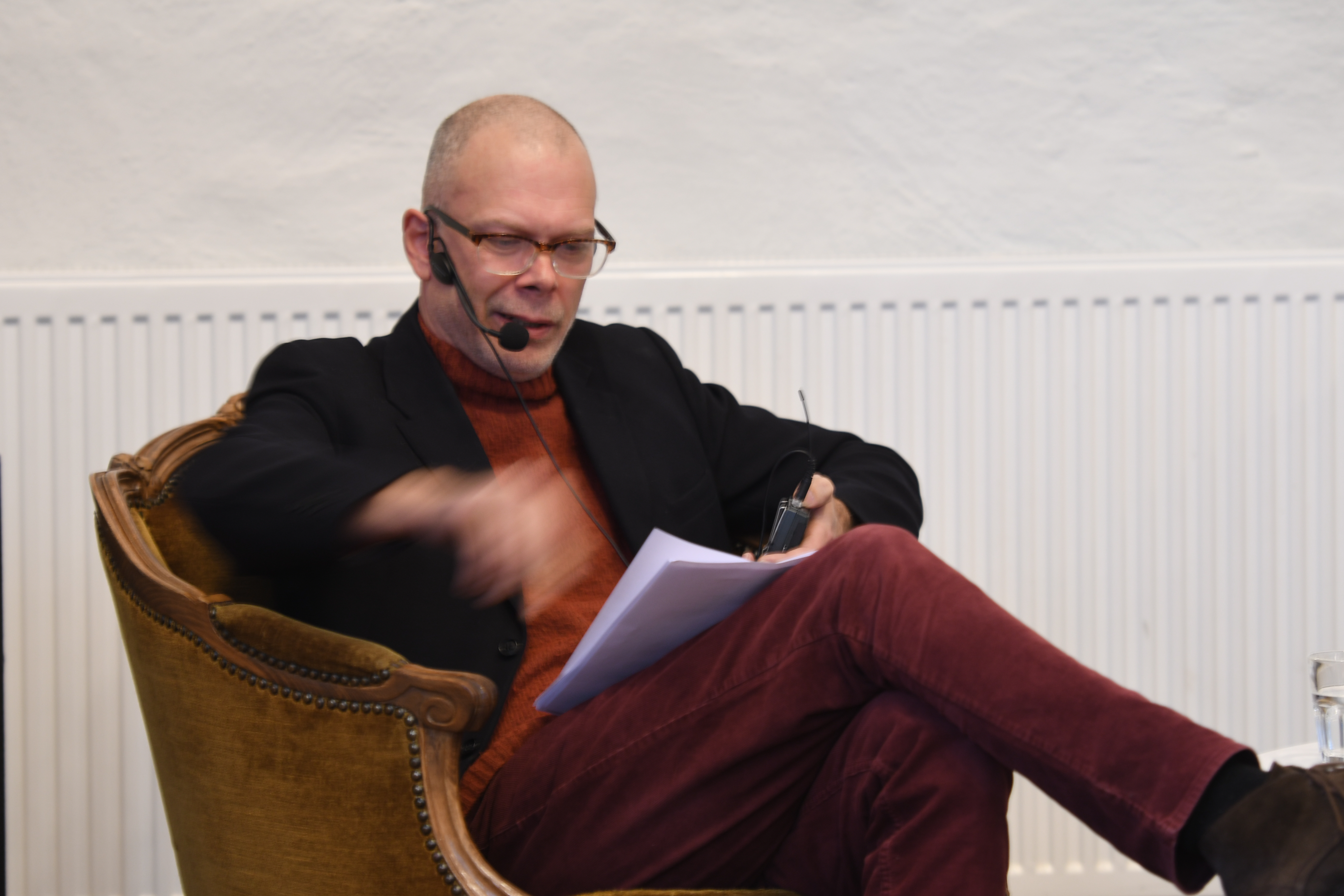 Garagets bokmässa 2018, Malmö. Niklas Qvarnström.